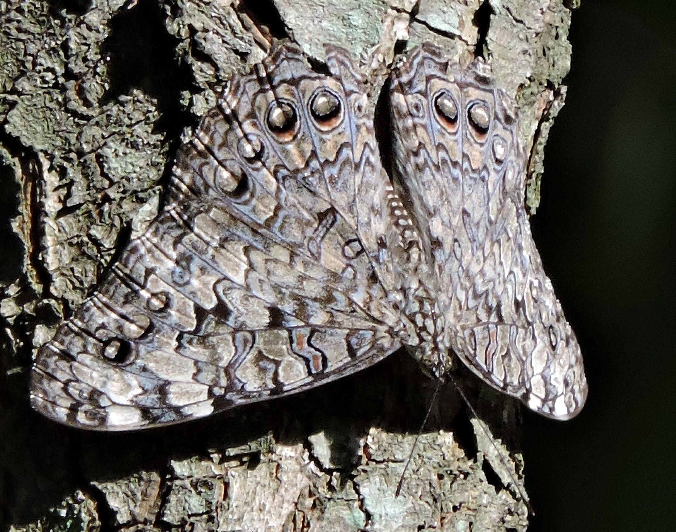 Hamadryas februa - Pindamonhangaba SP _ Brasil